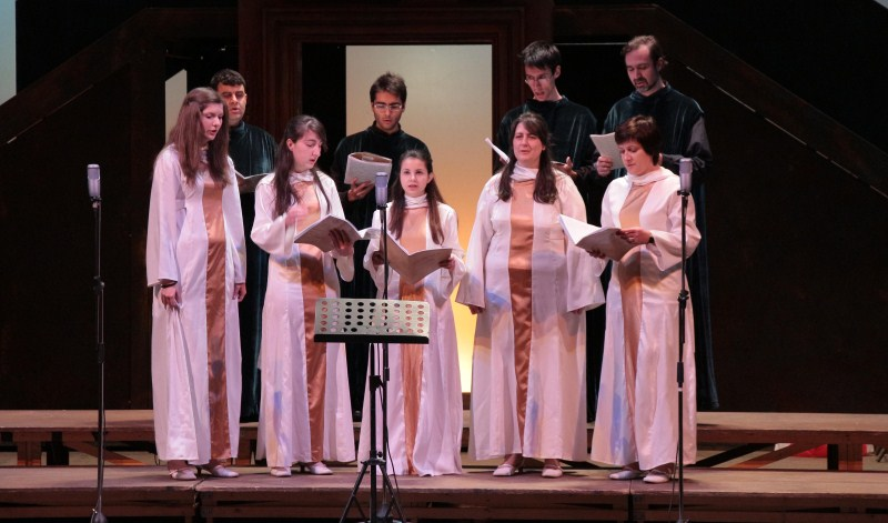 Coro Hosanna, vincitore del Festival International Chorus Inside "Special Edition: Osanna" 2013